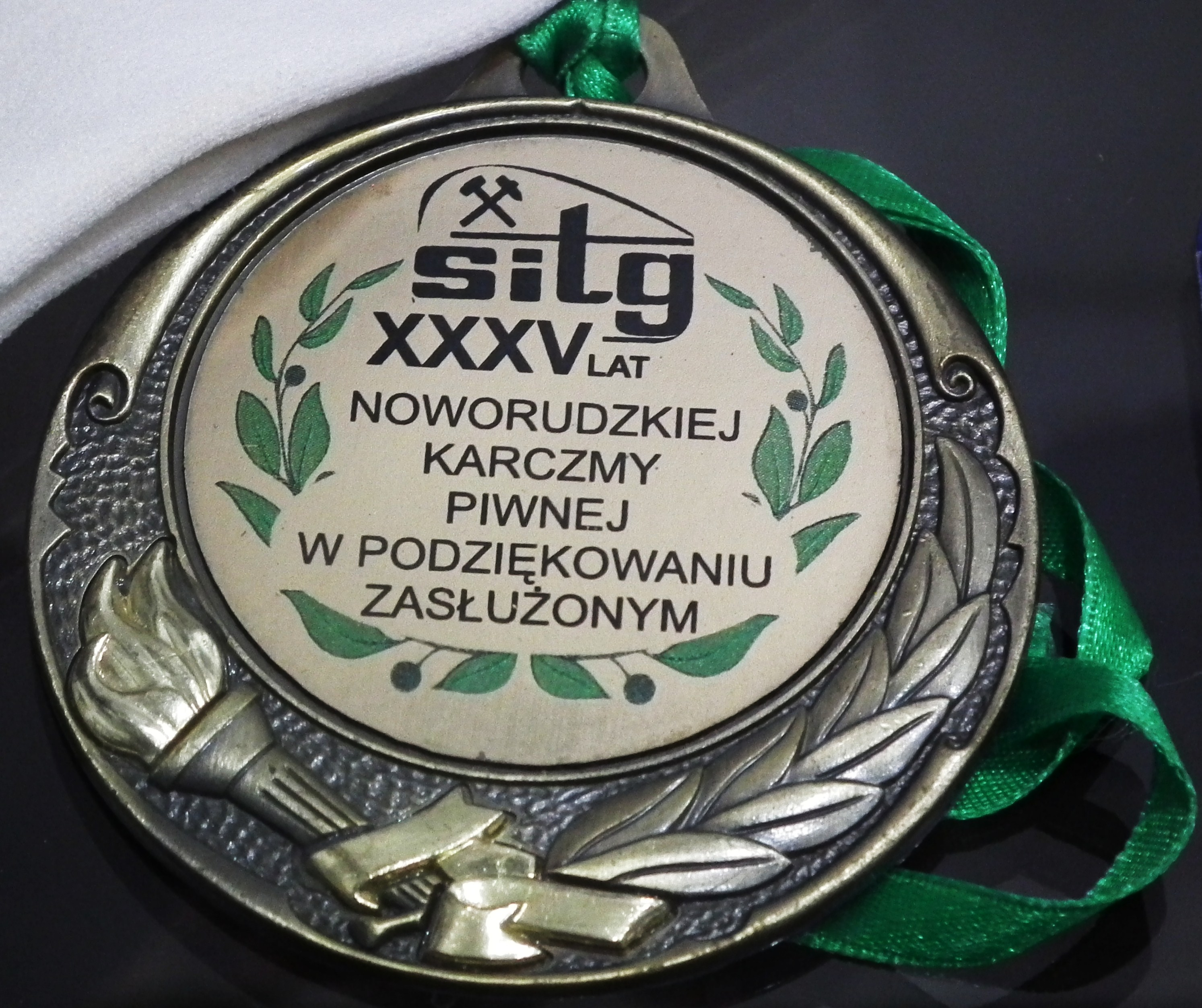 XXXV lat Noworudzkiej Karczmy Piwnej.